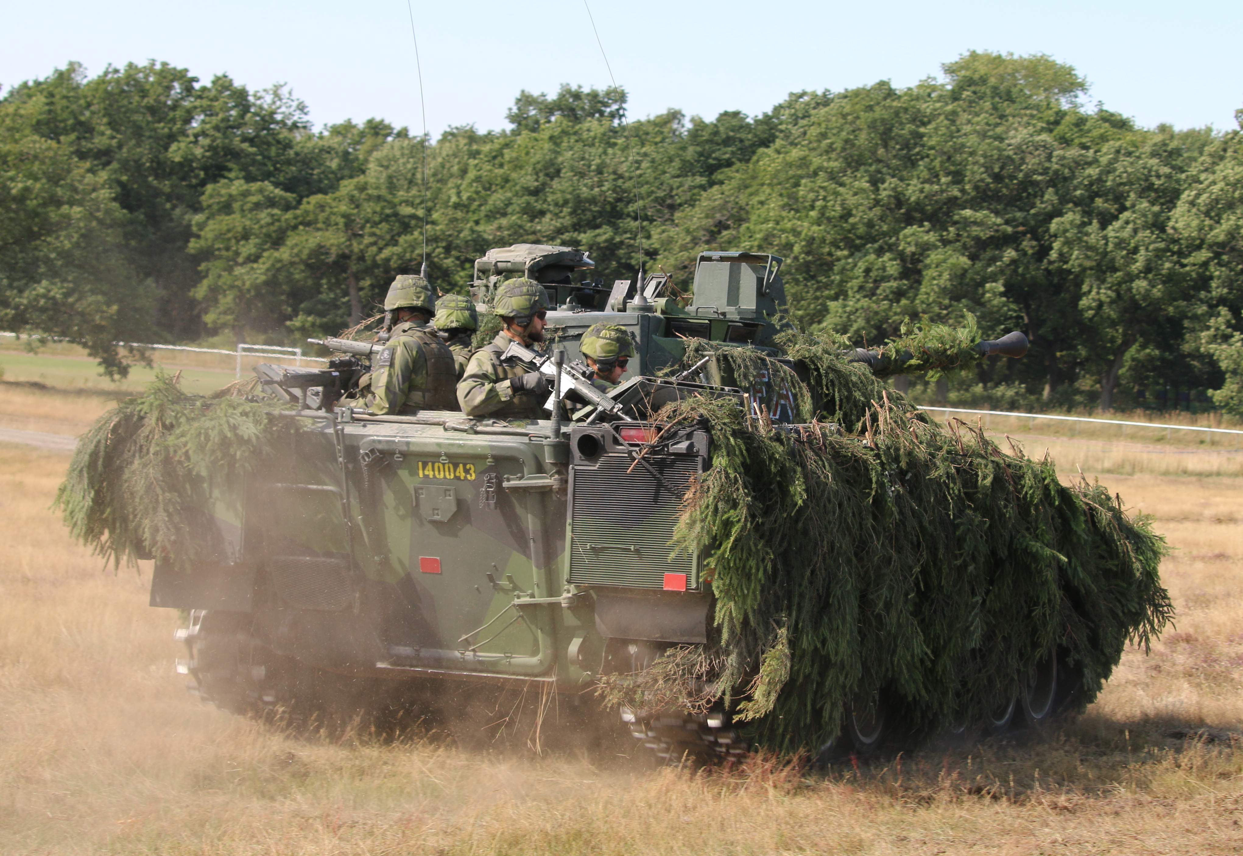 Stridsfordon 9040 Revinge 2015